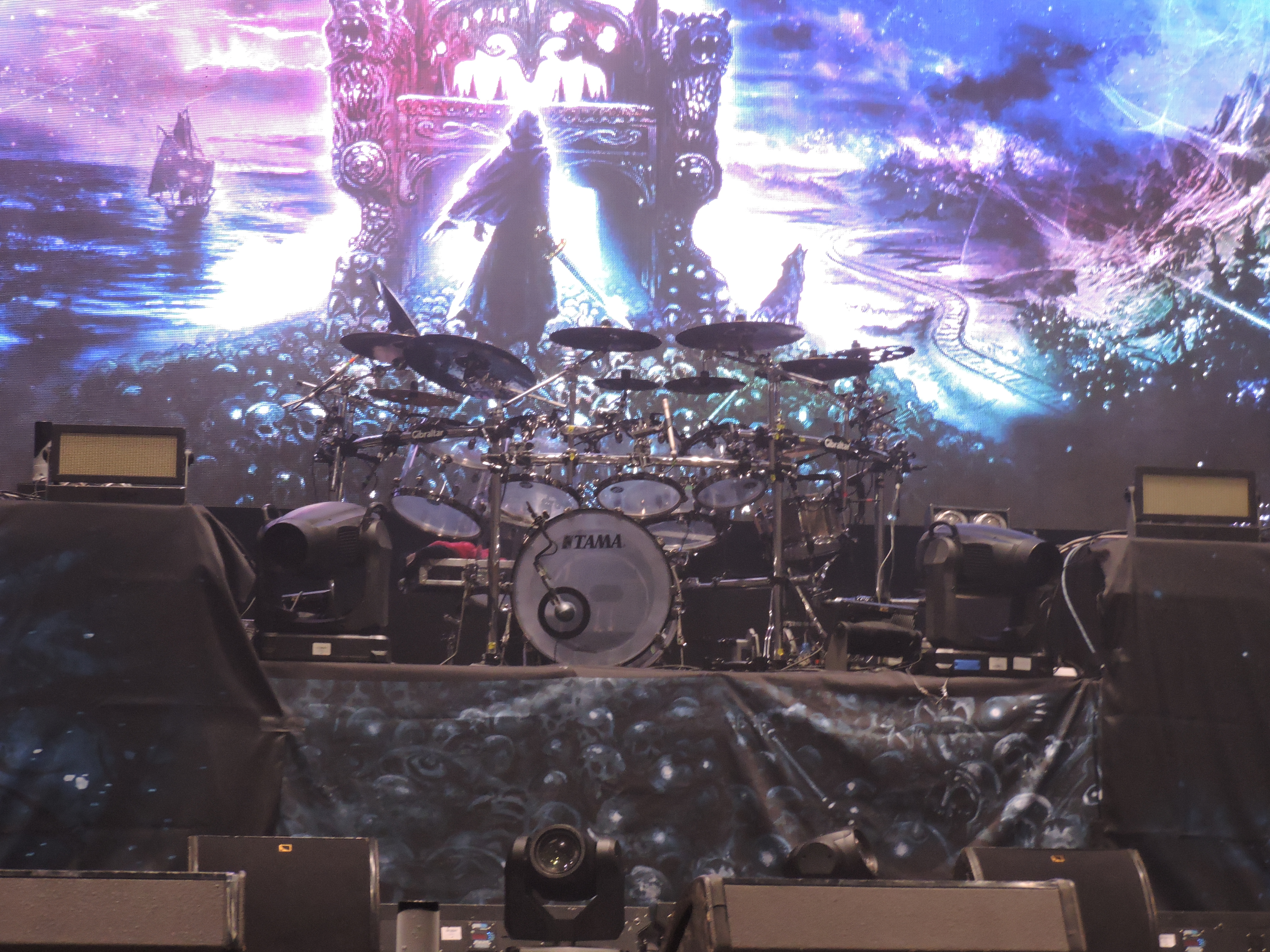 Ударная установка Манякина